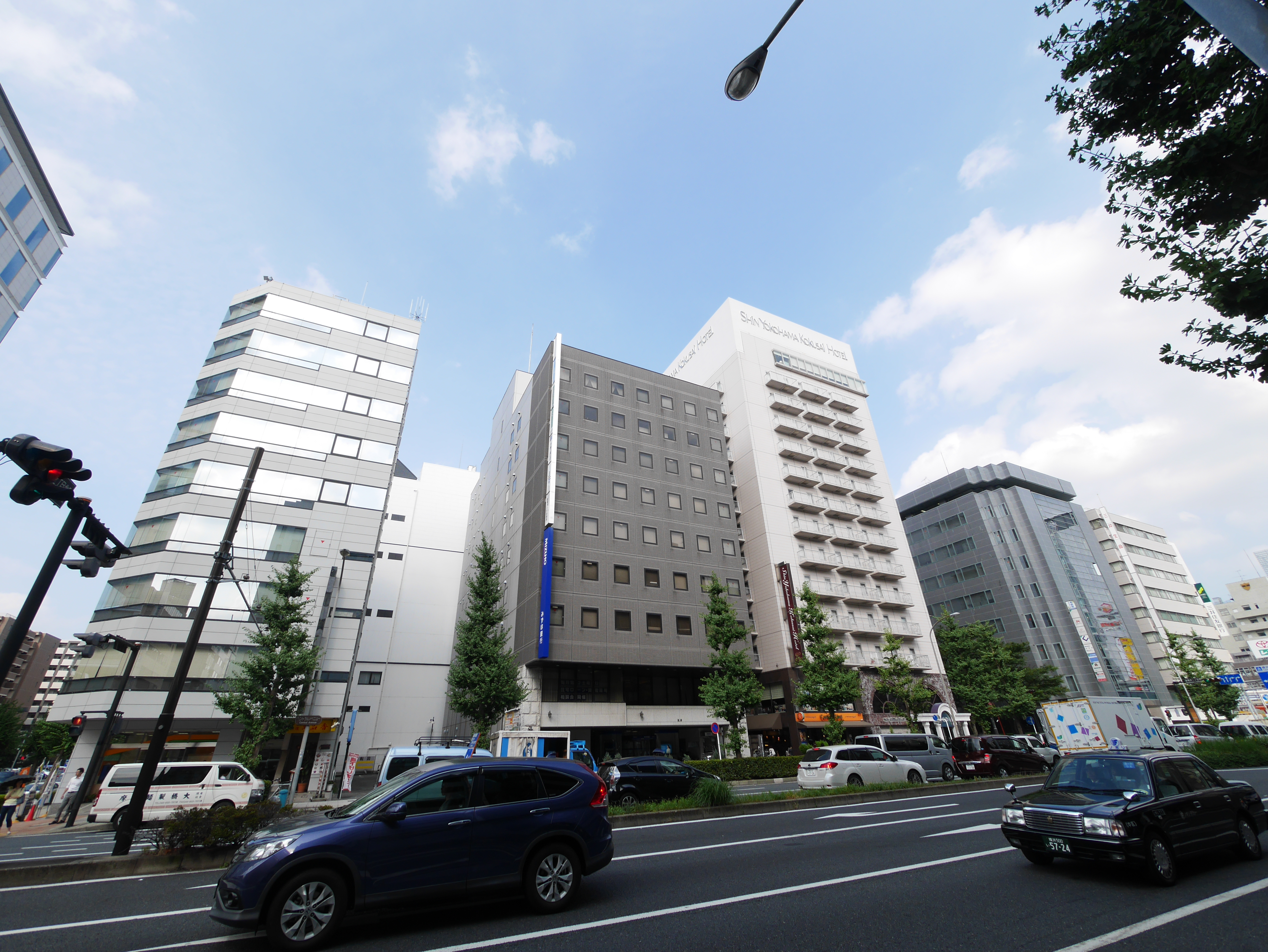 みずほ銀行・新横浜支店〔中央〕。港北区新横浜3丁目。道路は宮内新横浜線。右が新横浜駅方面。